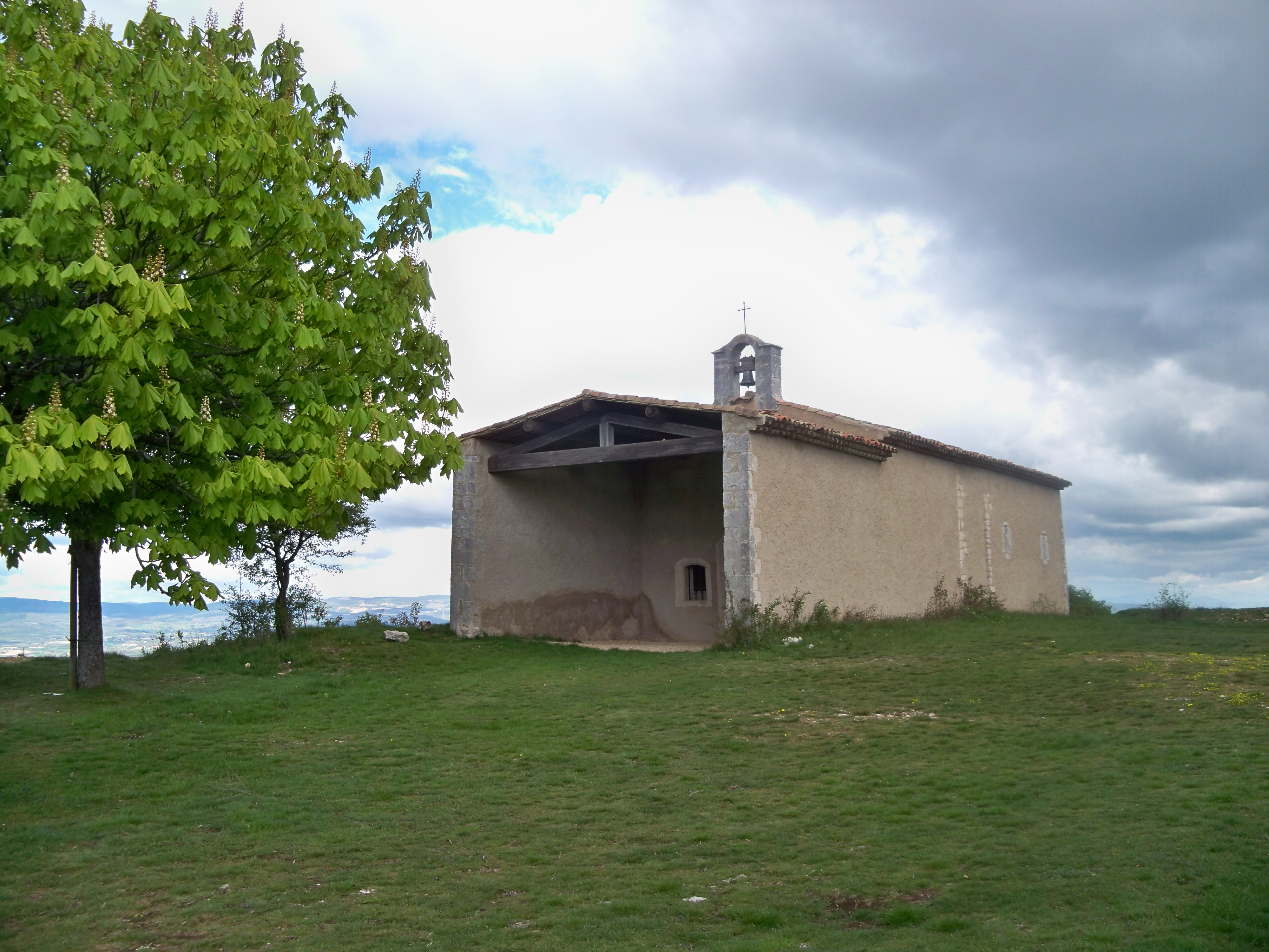 Chapelle Notre Dame de Lamaron, Lagarde d'Apt, Vaucluse, France